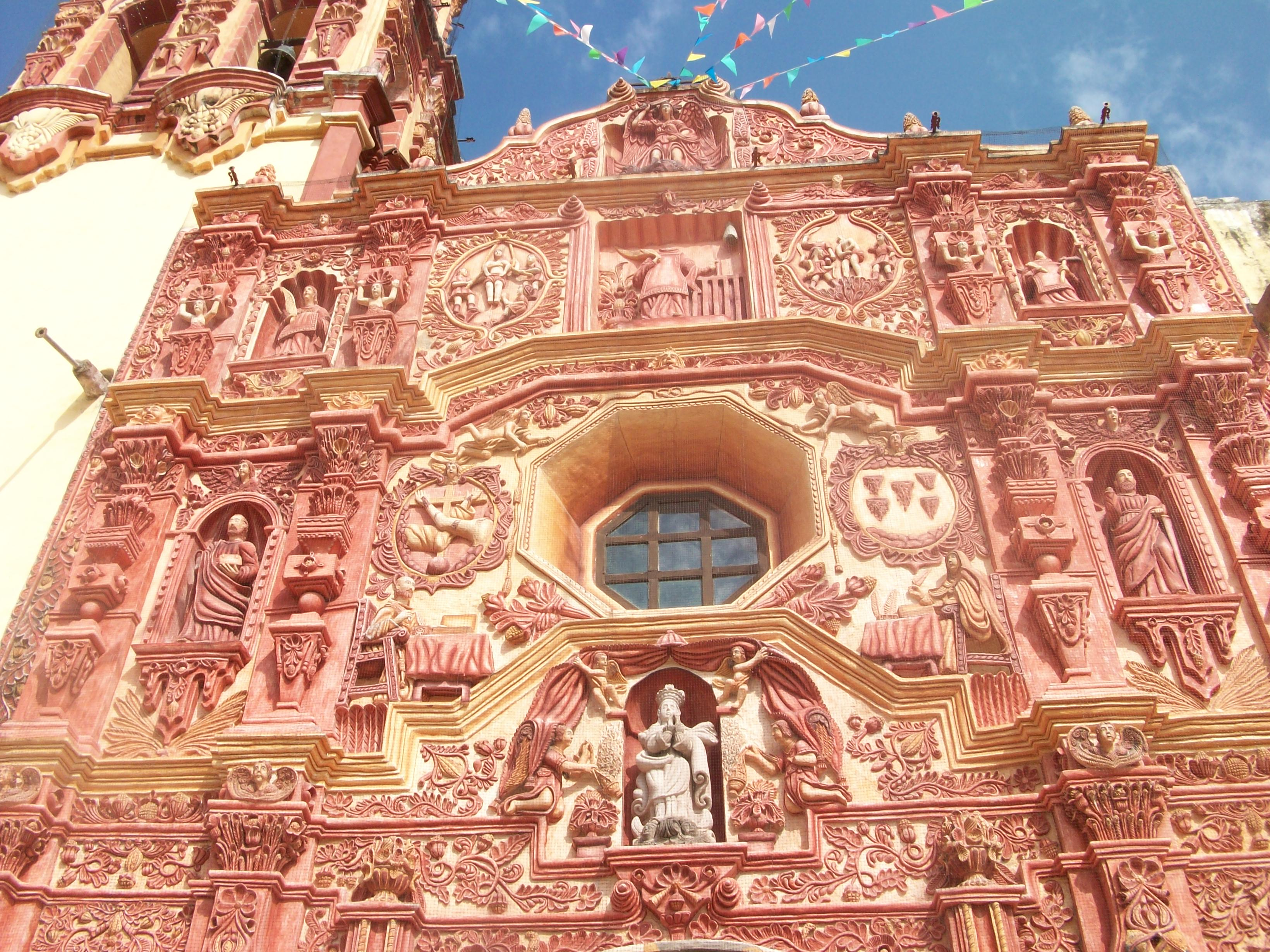 Misión de Landa de Matamoros